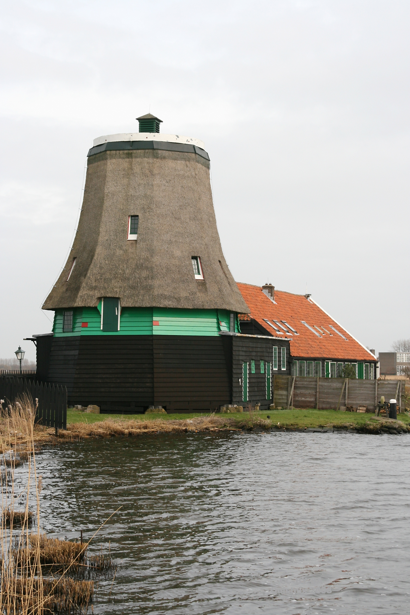 Zaanse Schans: Molen De Os, zonder kap en wieken